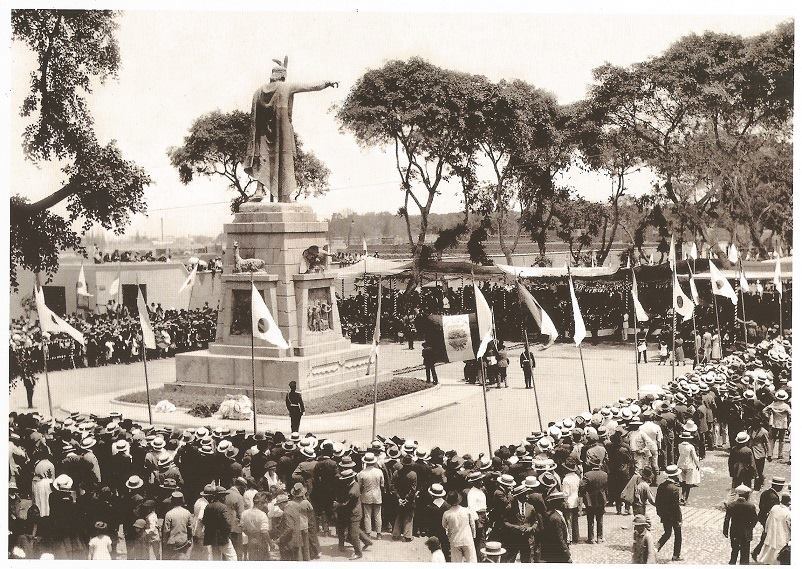 Inauguración Plaza Manco Capac